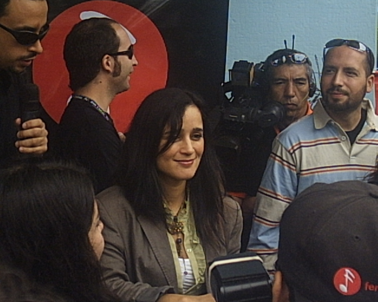 Julieta Venegas firmando autógrafos en Feria del Disco después de su presentación en Viña del Mar